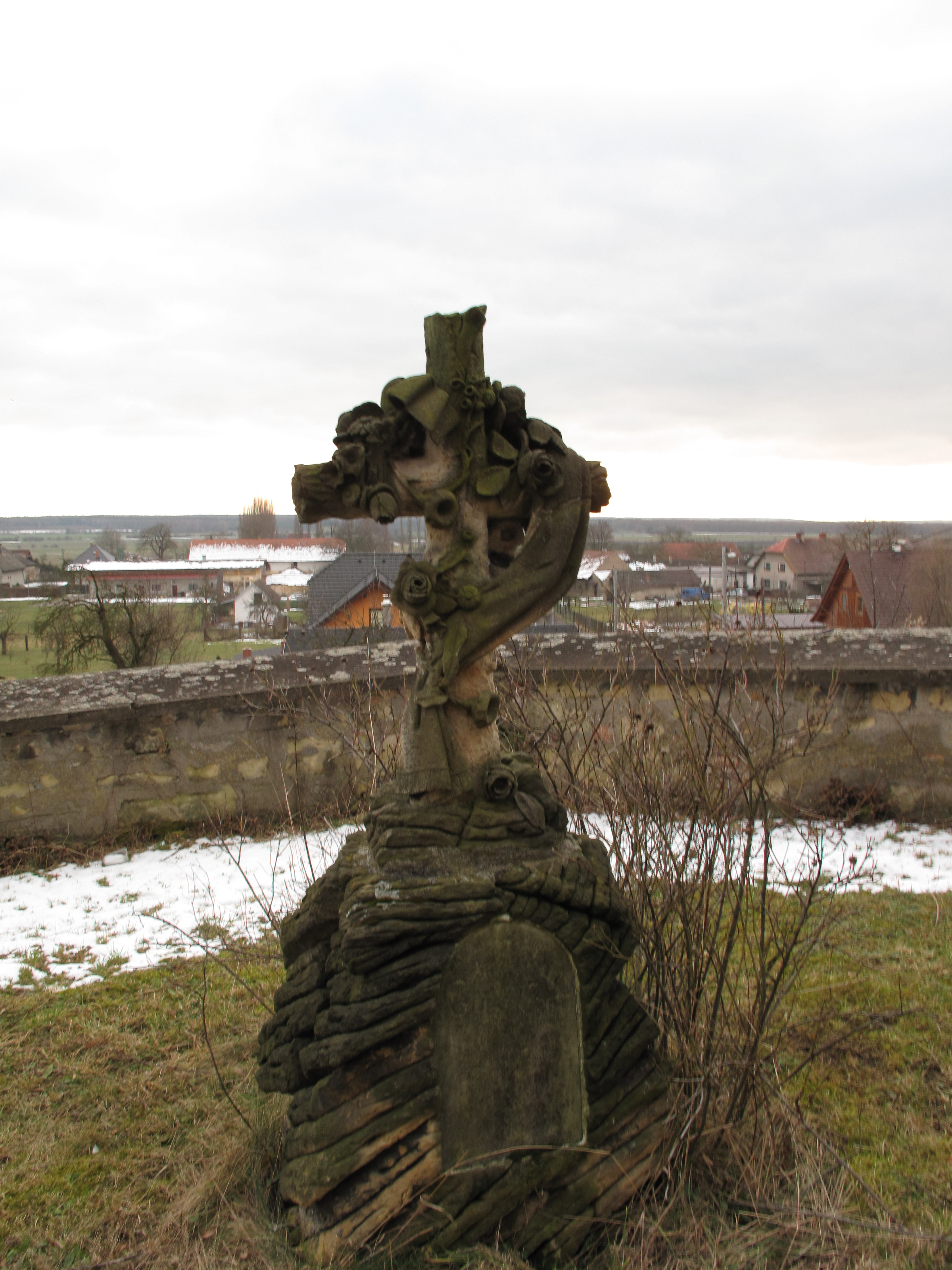 Pomník v Žerčicích. Okres Mladá Boleslav, Česká republika.